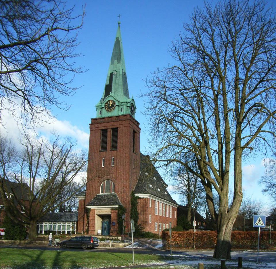 Kirchengebäude der Gemeinde Groß Flottbek (erbaut 1912)